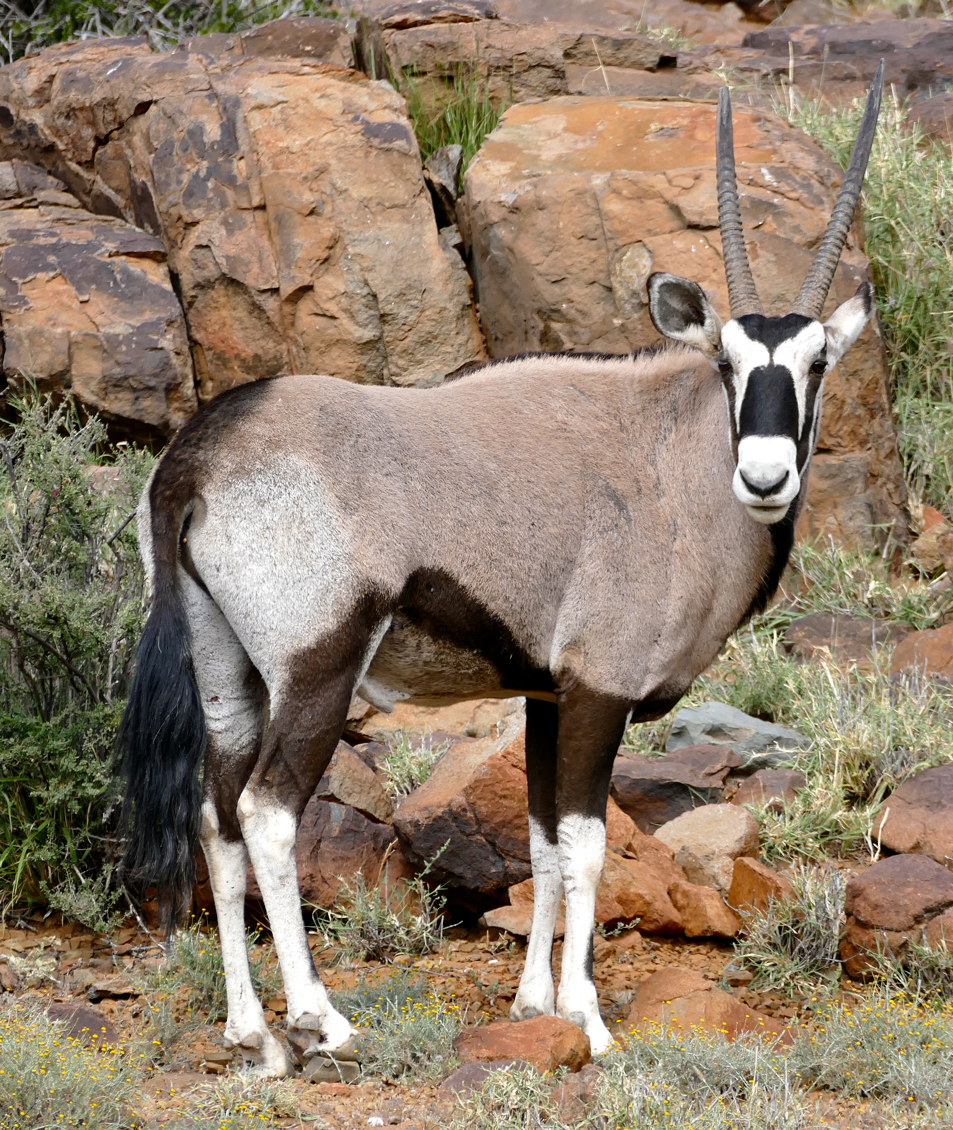 Potlekkertjie Loop, Karoo NP, Western Cape, SOUTH AFRICA